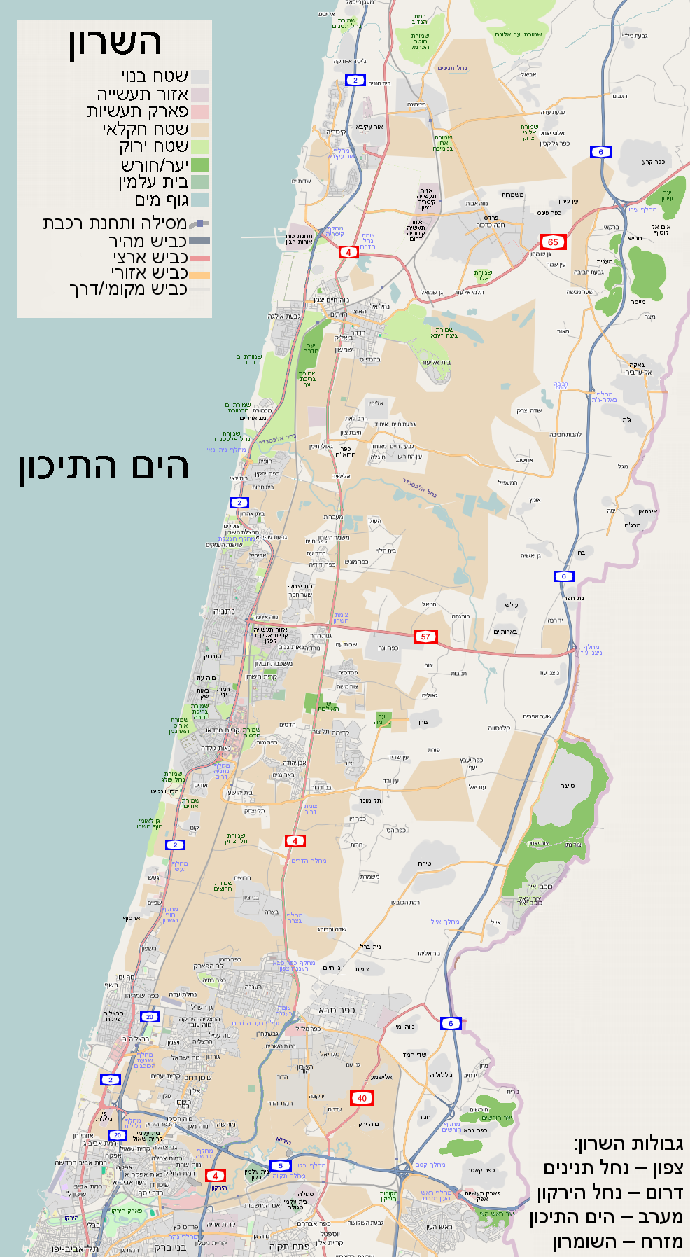 השרון